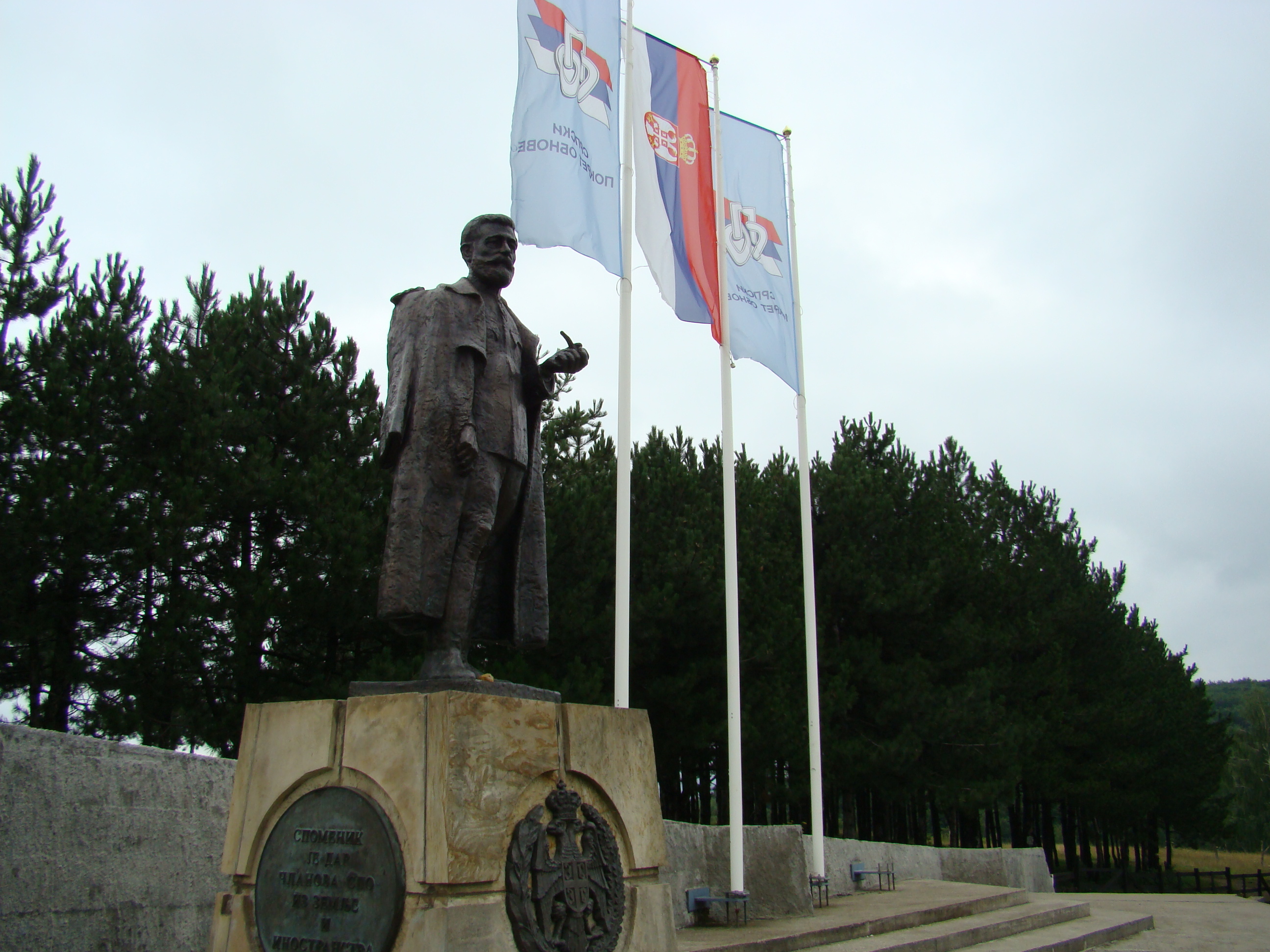 Споменик Дражи Михаиловићу на Равној гори